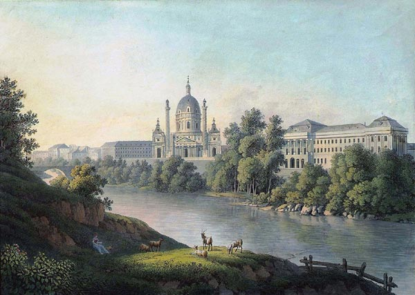 Blick vom linken Wienflußufer gegen die Karlskirche, 1822; Ölgemälde. Wien Museum